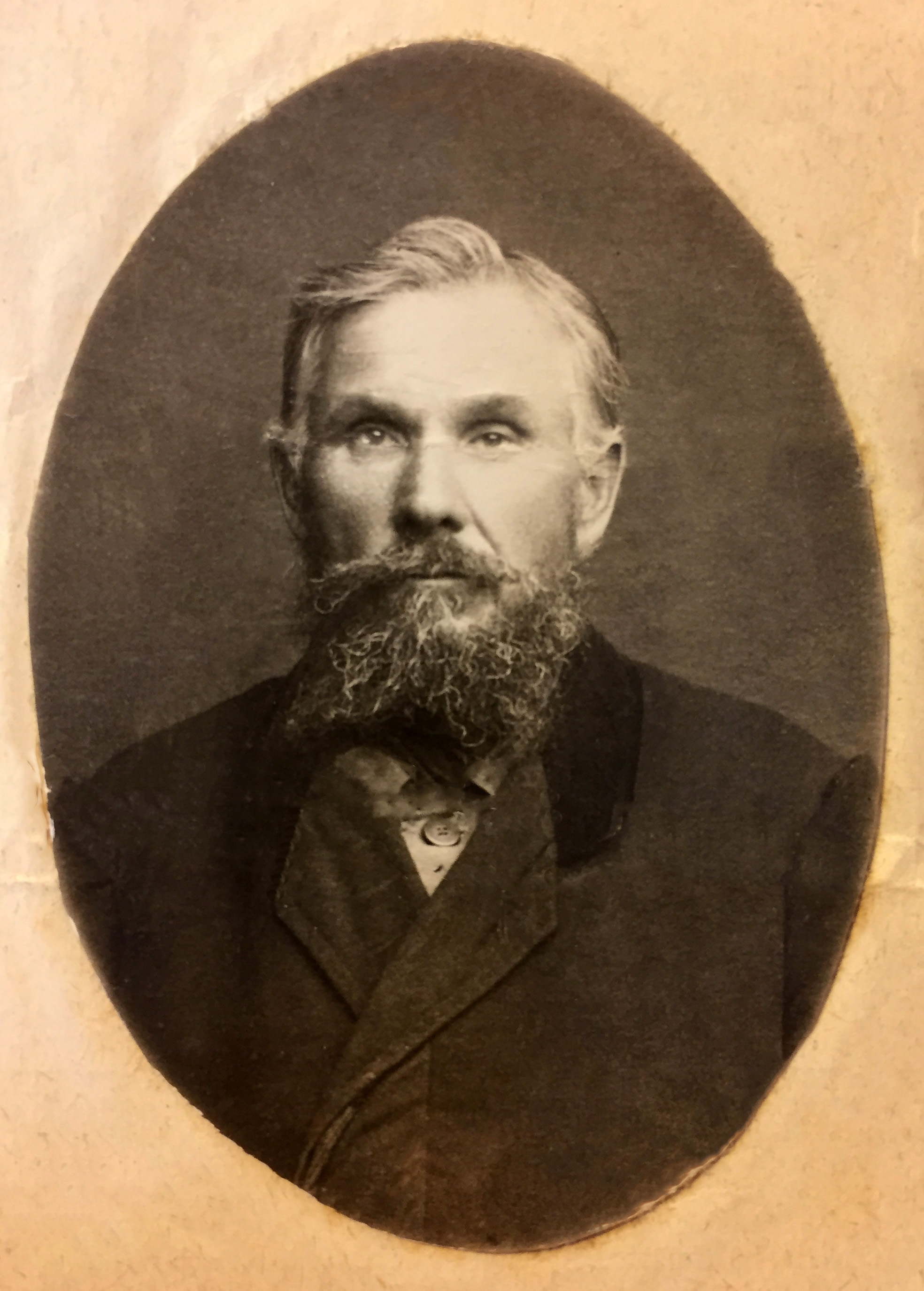 Я.Ф. Артаев